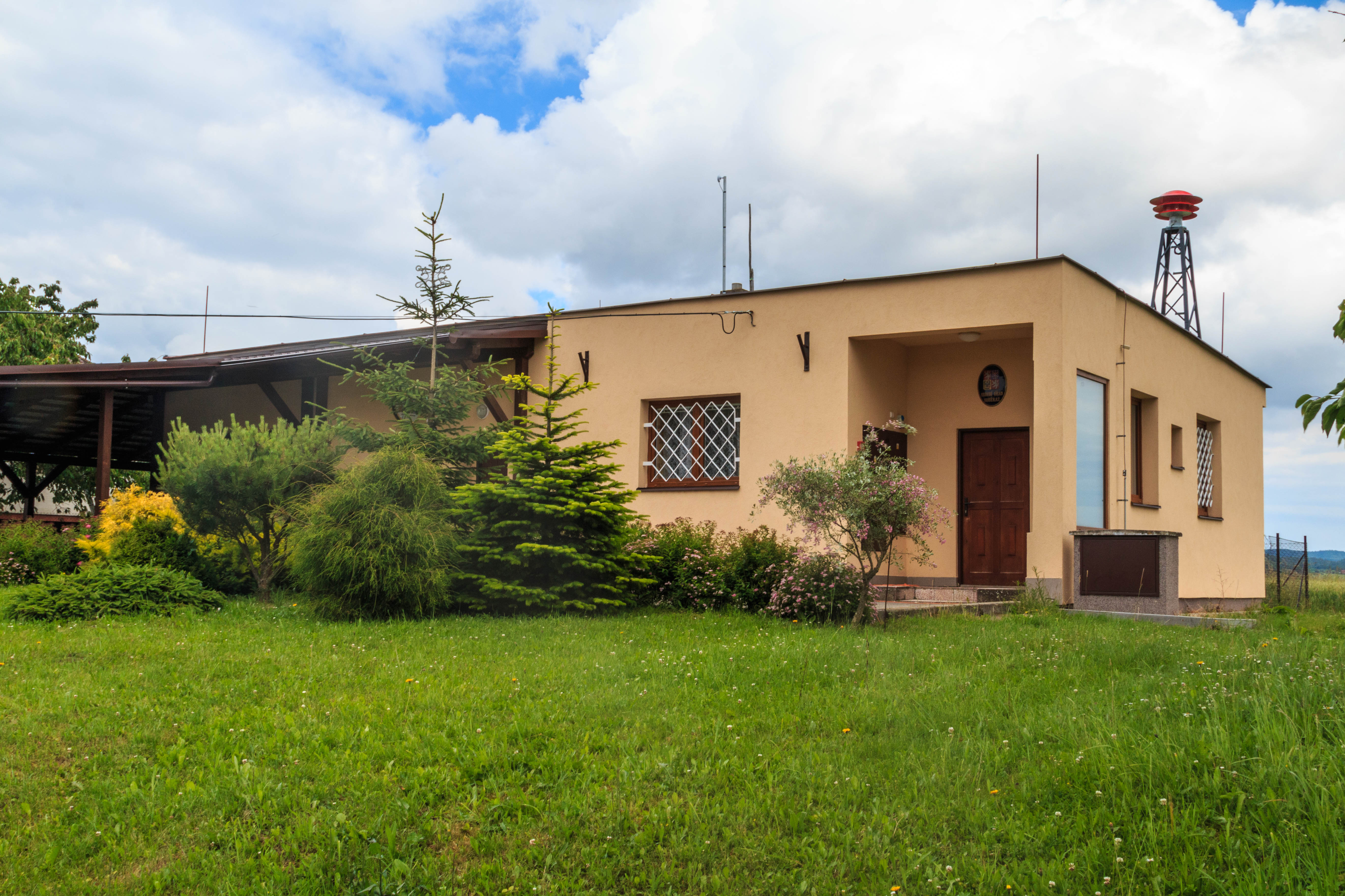 Soběraz obecní úřad